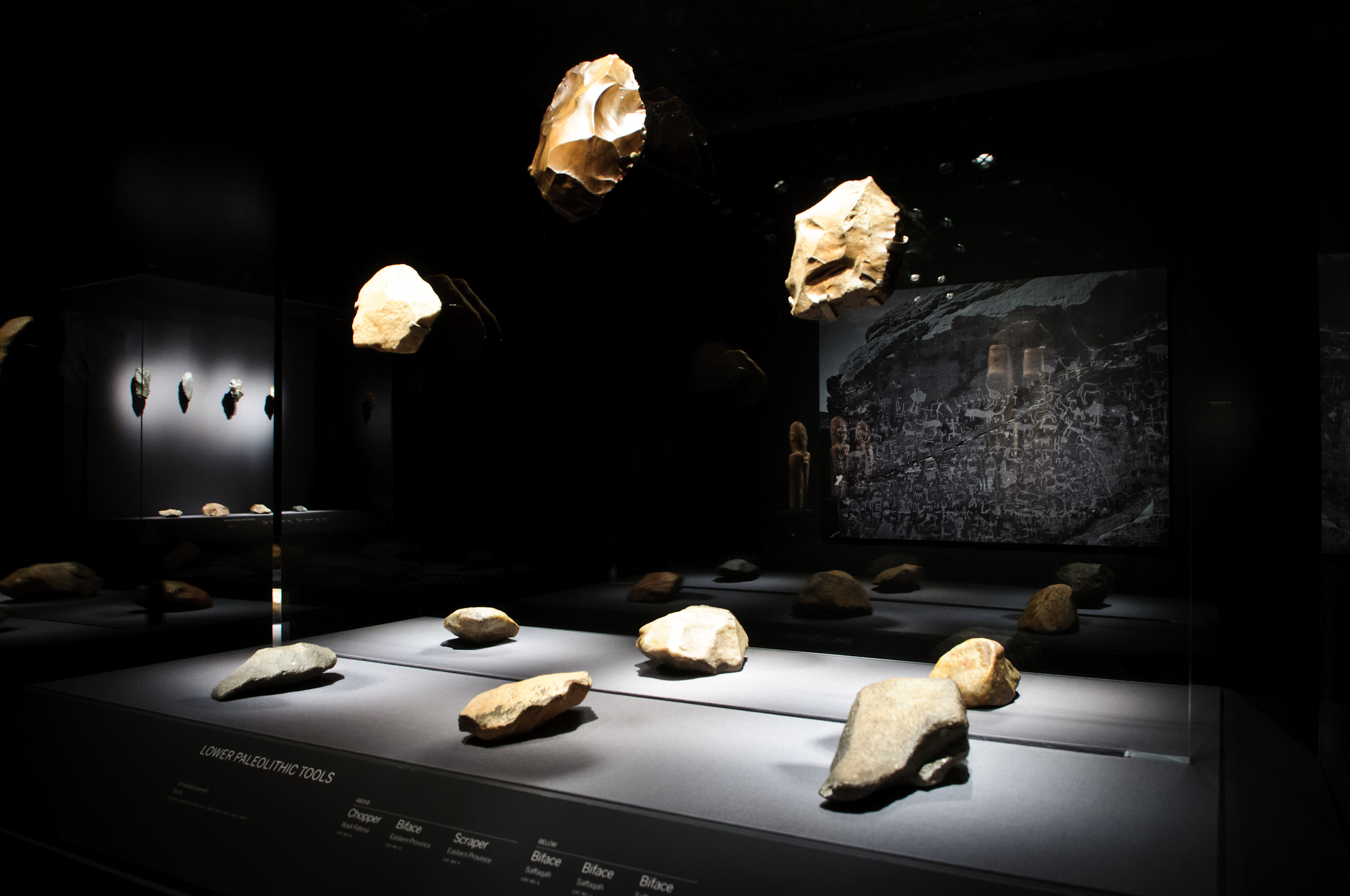 صورة مكاشط حجرية من حضارة المقر (8100 قبل الميلاد)